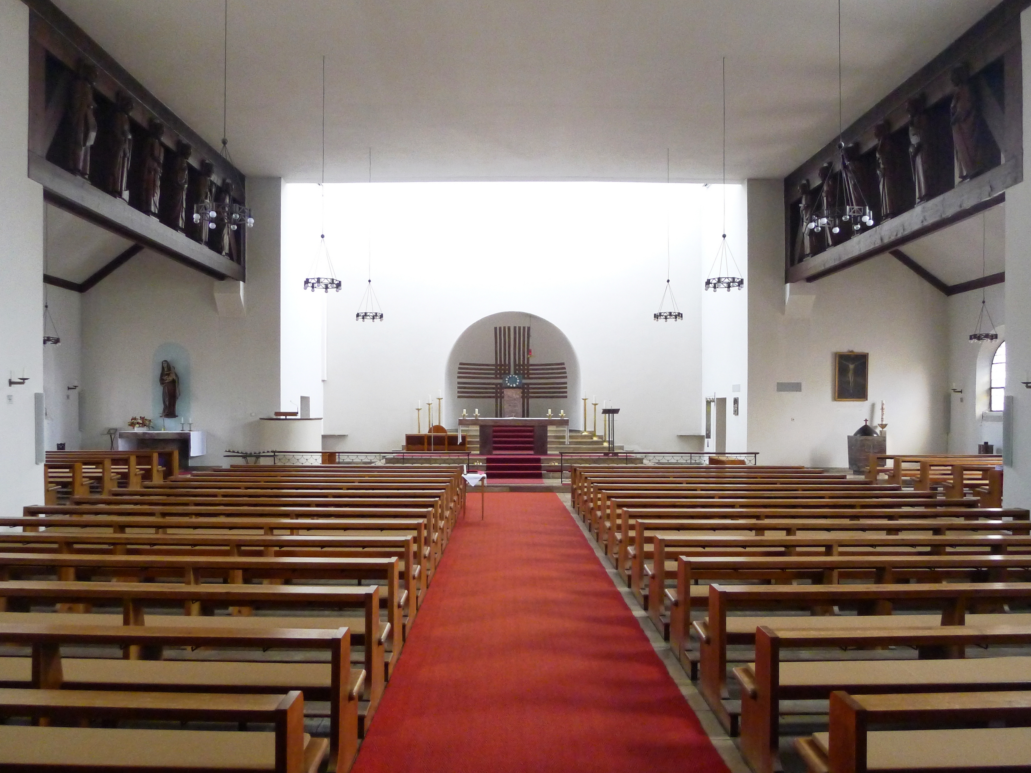 Blick vom Eingang in den Innenraum der Kirche